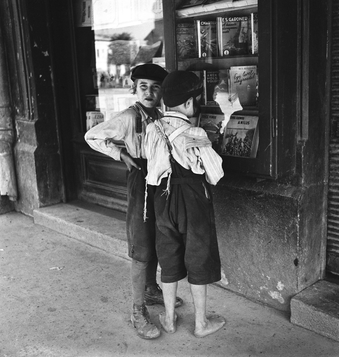 Podkarpatská Rus, Užhorod